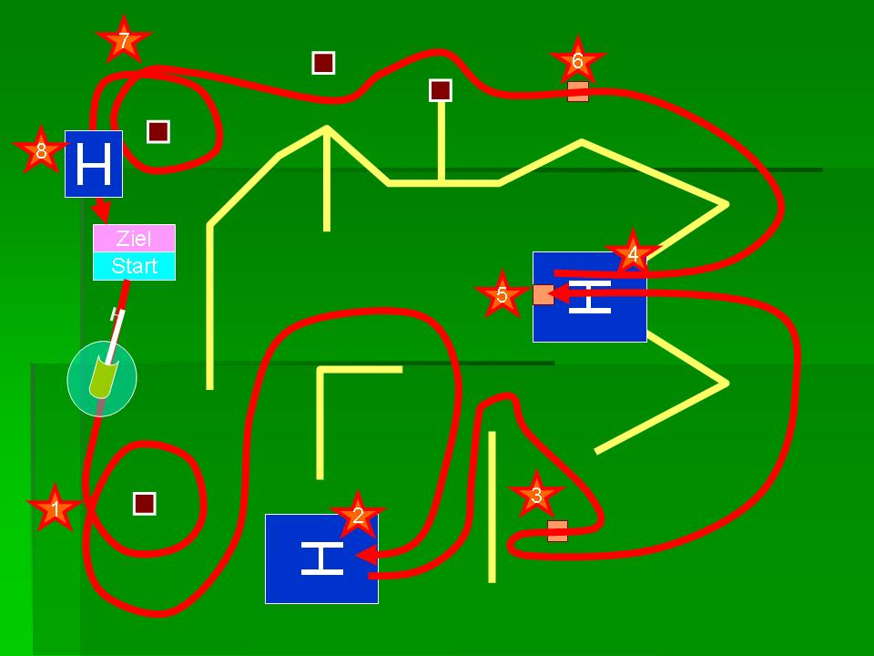 Beispiel eines Indoorparkours für Modellhelis